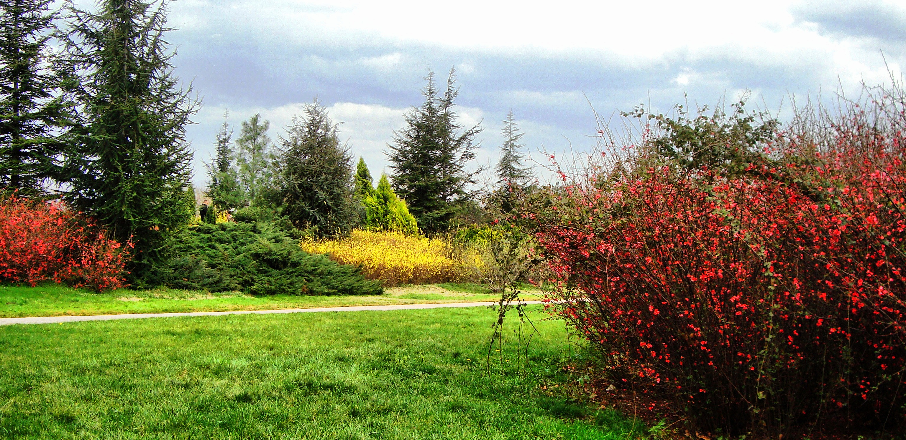 Botanik park -Bursa .09 march 09